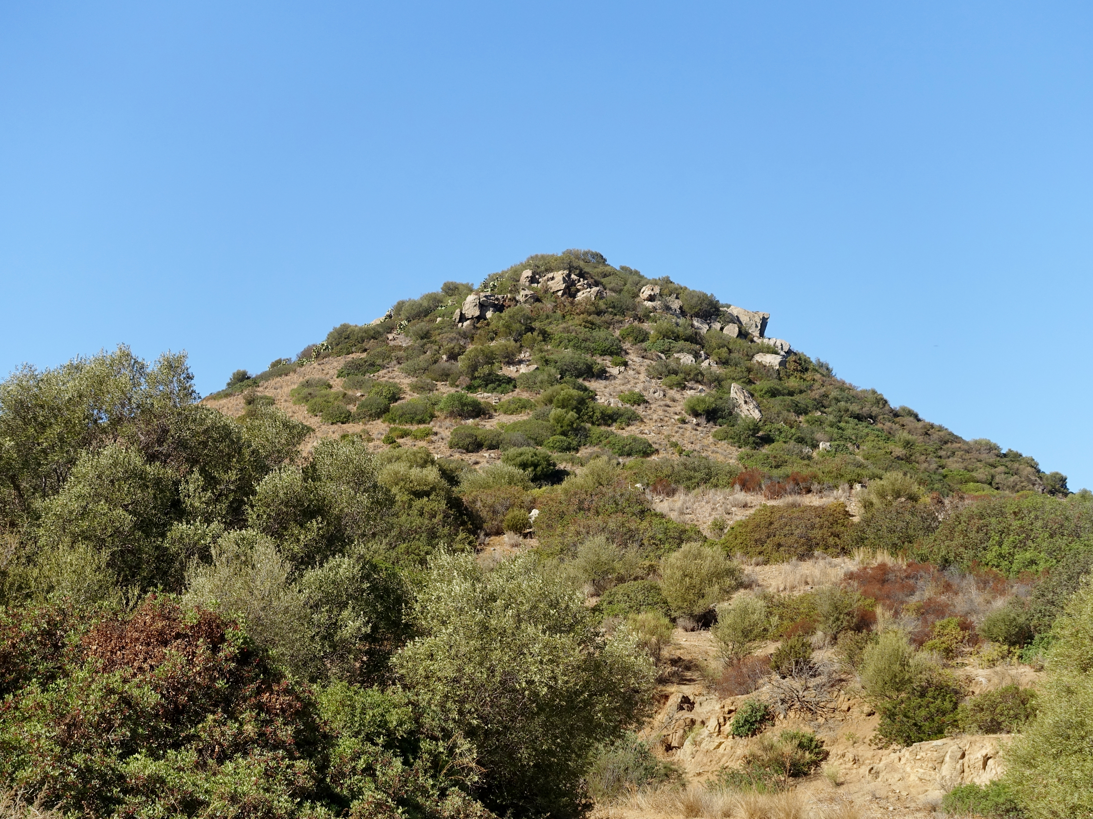 Nuraghe von Cuccureddus, Gemeinde Villasimius, Sardinien, Italien